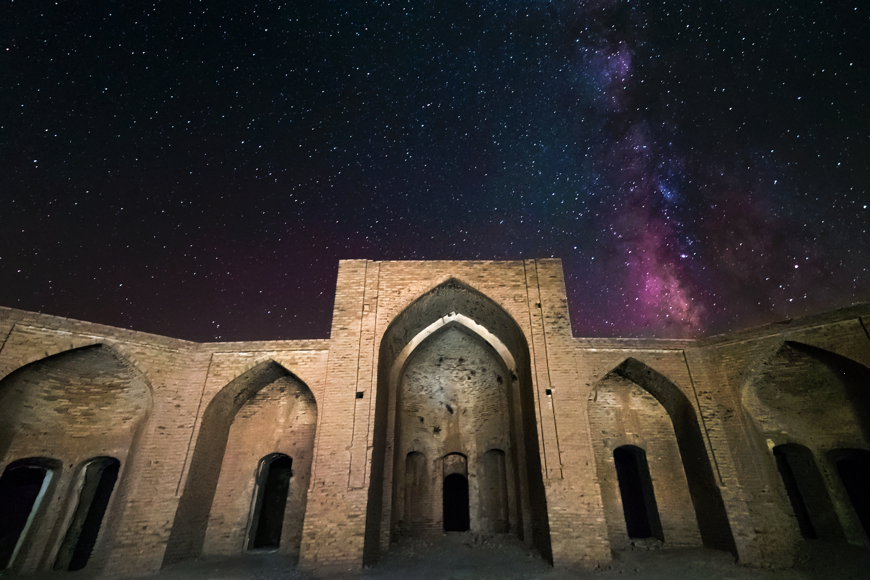 مجموعه عباس آباد با توجه به فاصله داشتن مناسب از شهر های تایباد و تربت جام مکانی تاریک محسوب شده و بسیار مناسب برای عکاسی و رصد ستارگان توسط منجمین آماتور و حرفه ای محسوب می شود تور های نجوم و رصد ستارگان به صورت فصلی در این کاروان سرا برگزار می شود.